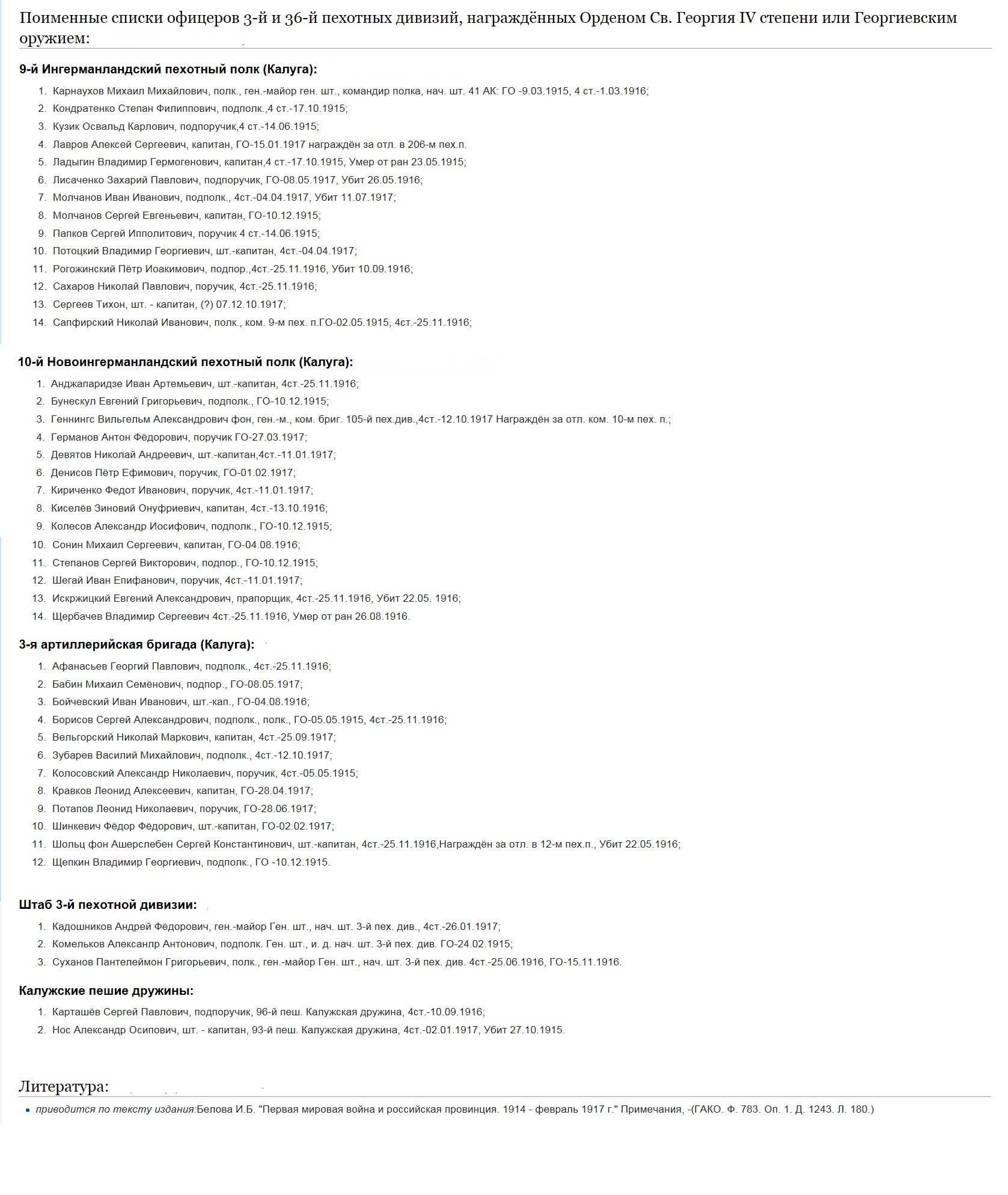 Текст приведён по изданию: Белова И.Б. "Первая мировая война и российская провинция. 1914 - февраль 1917 г." - М.: АИР0-ХХ1, 2011., приложение 14. - ISBN 978-5-91022-164-6.